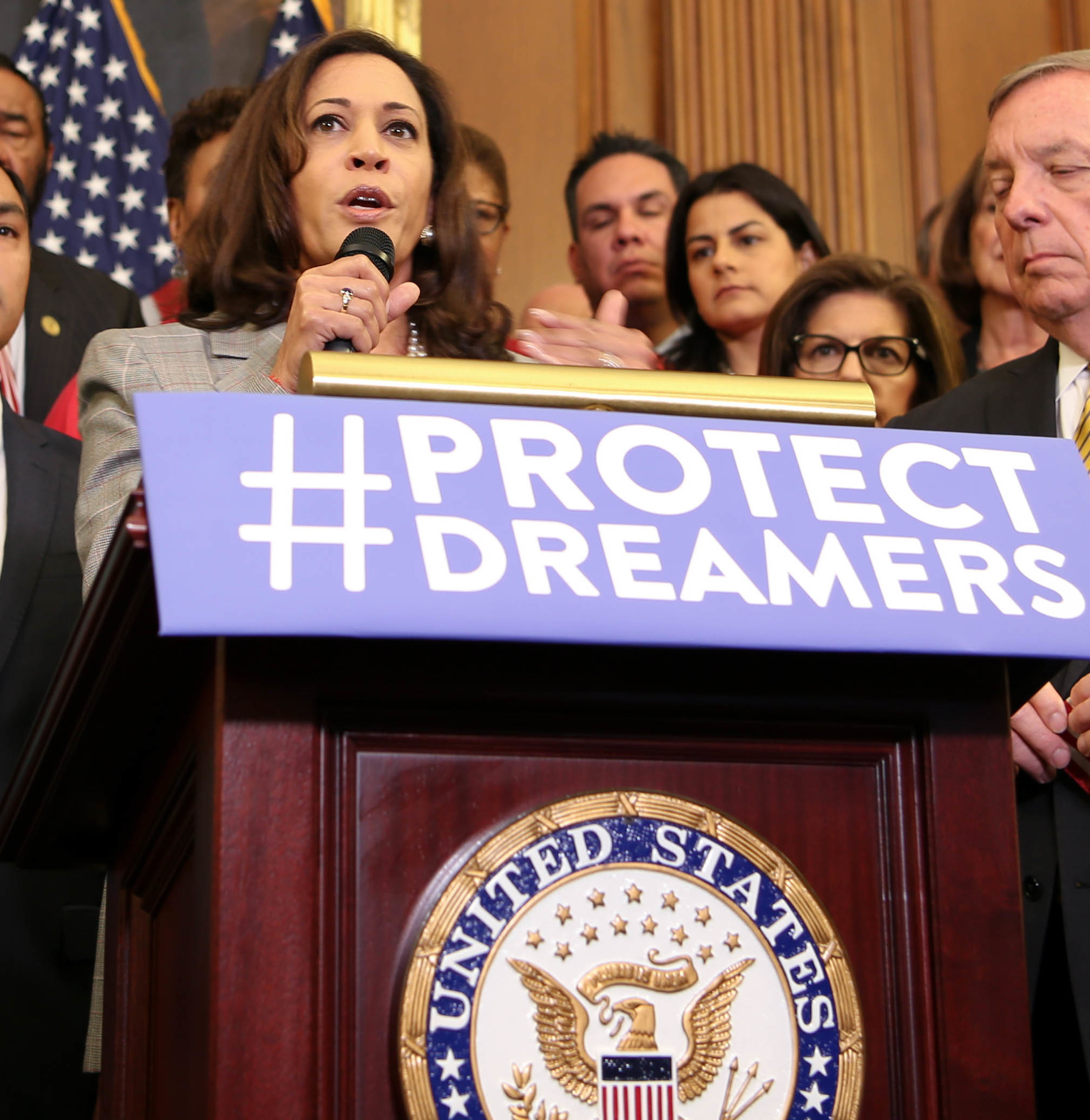 DACA4